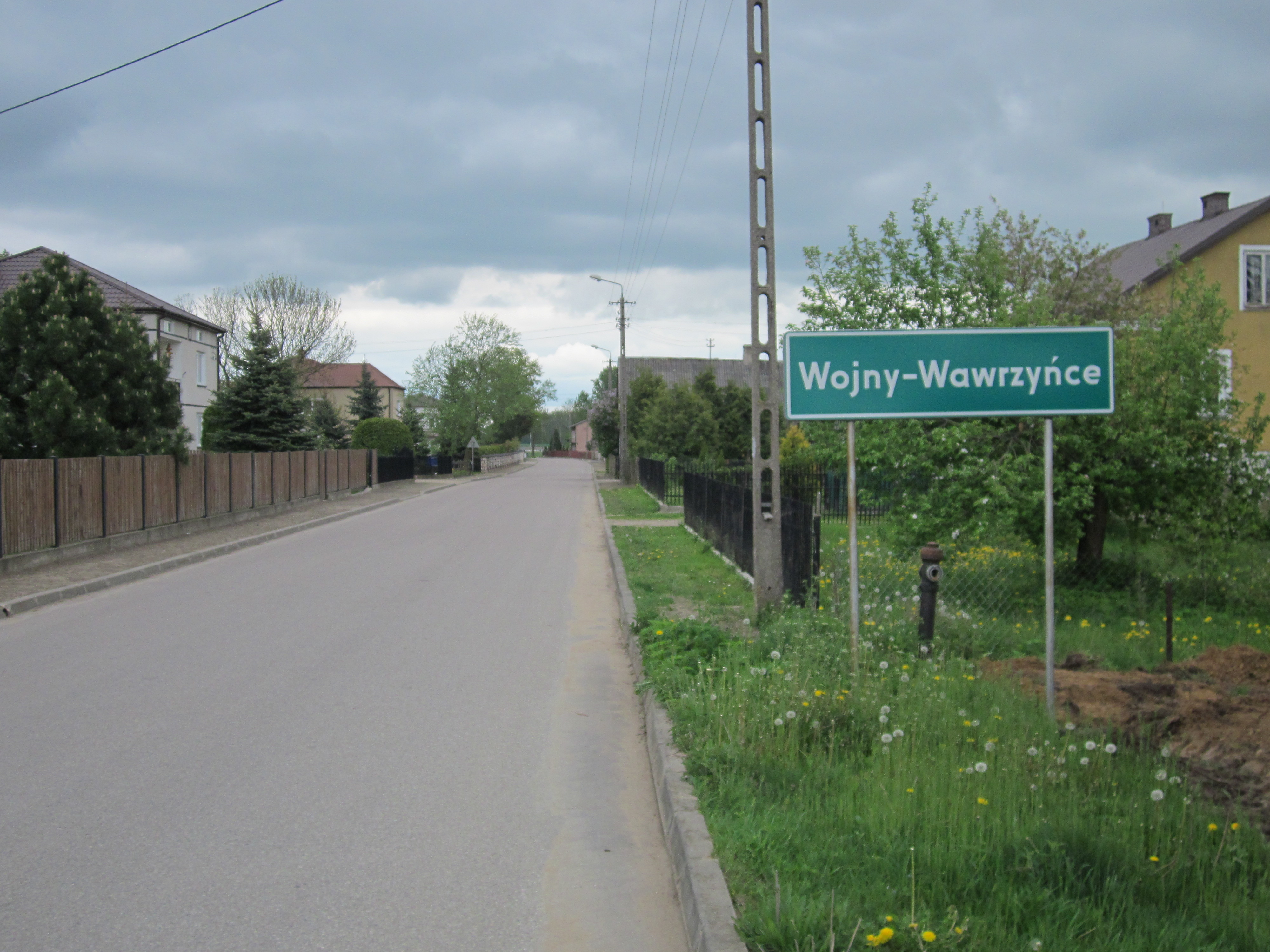 Miejscowość na terenie gminy Szepietowo.